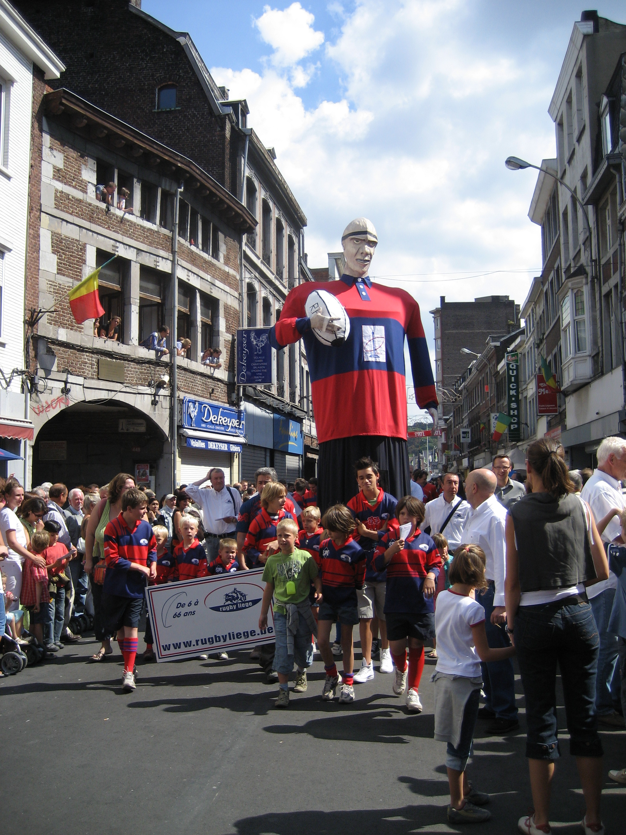 Le géant Xhovémont dans les rues d'Outremeuse à Liège, le 15 août 2008.